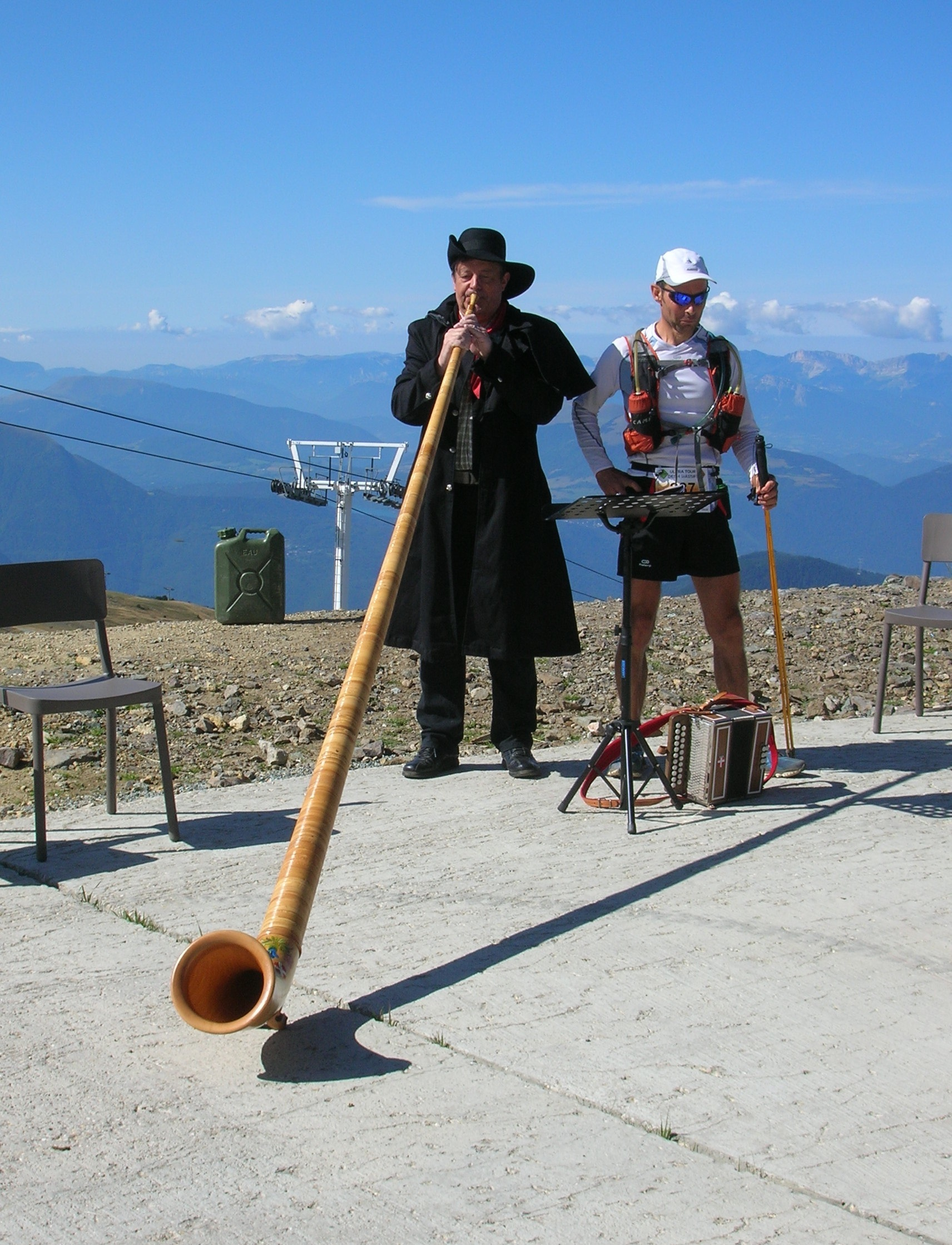 Croix de Chamrousse. animation au Poste de ravitaillements de l'Ultratour des 4 massifs (UT4M). Musicien savoiarde qui joue le cor des alpes. Chamrousse, Isère, AuRA, France.